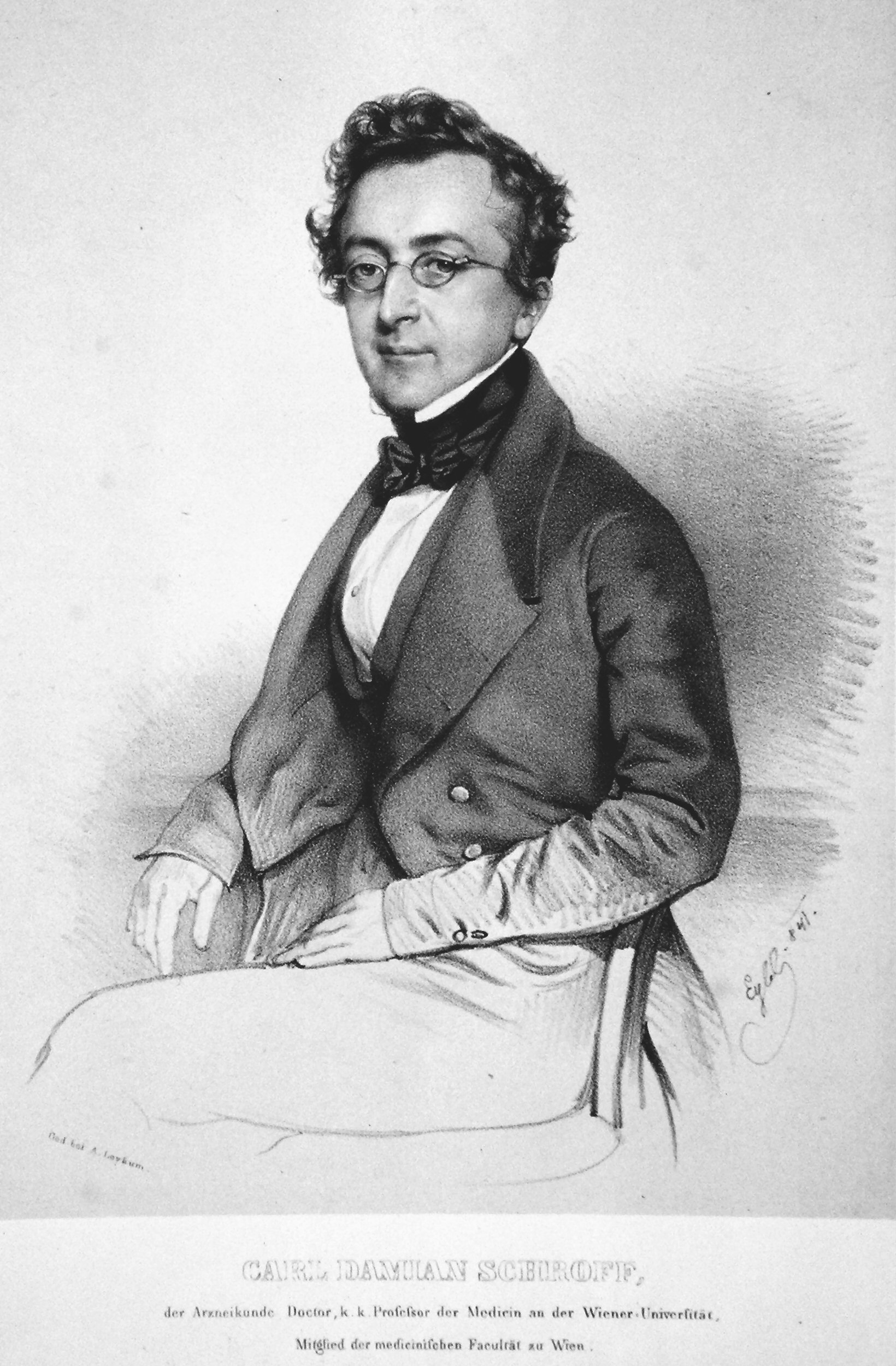 Karl Damian Schroff (1802-1887), österreichischer Arzt, Lithographie von Franz Eybl, 1841